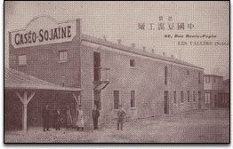 Caseo-Sojaine